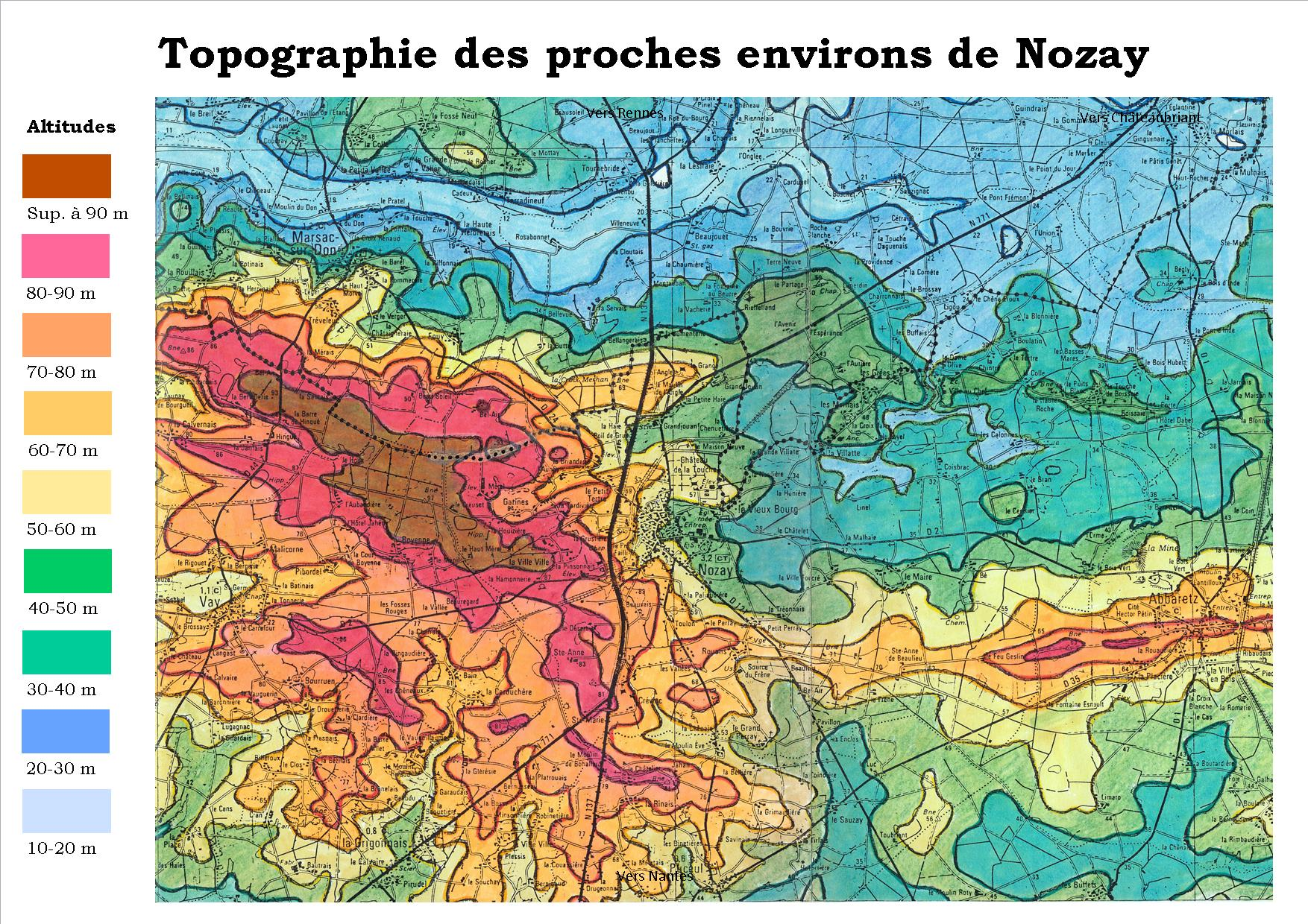 Carte du relief de la région de Nozay